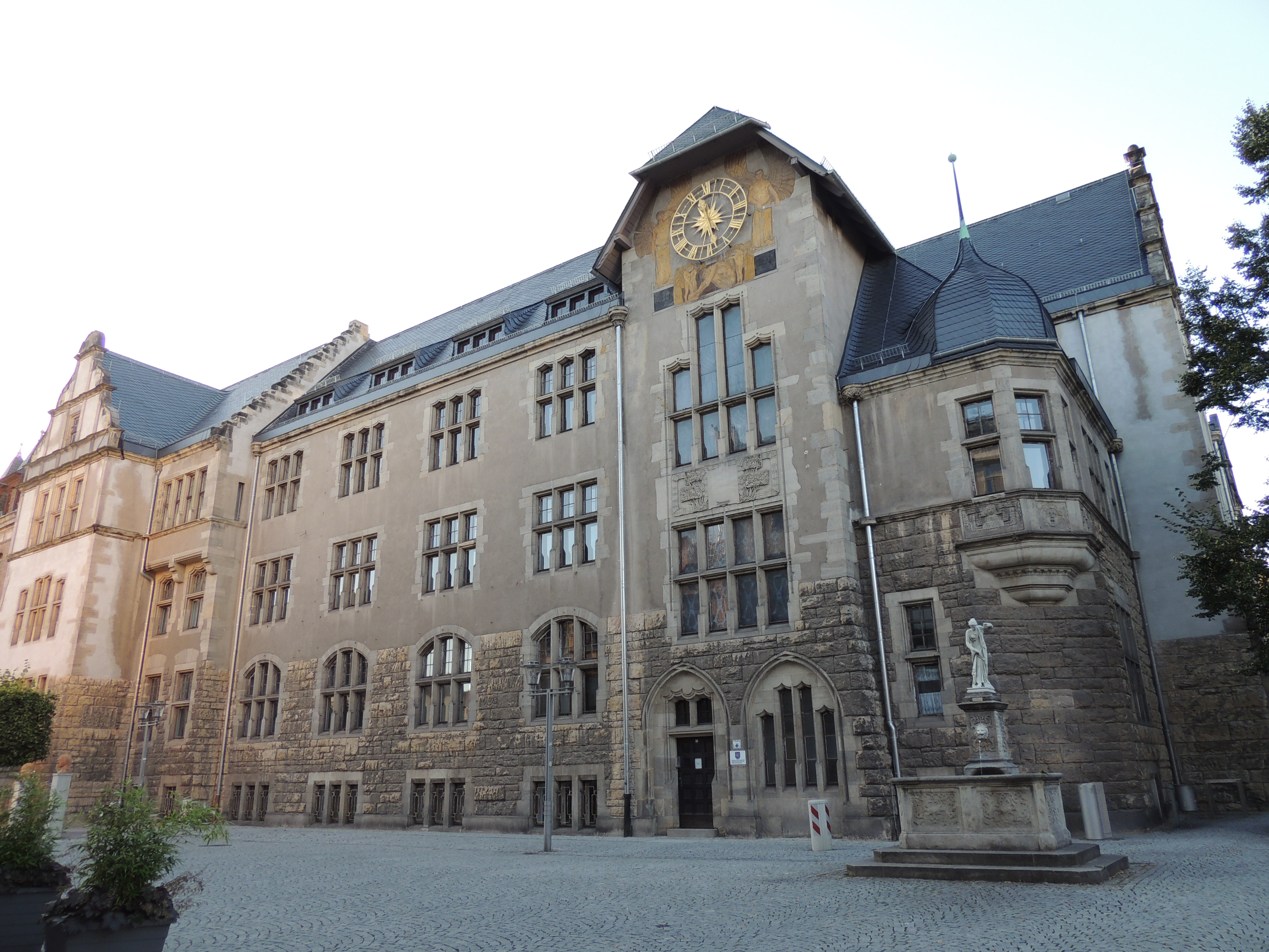 Amtsgericht in Rudolstadt, Marktstraße 54; erbaut 1904-1905 als "Justizgebäude" (für das Fürstlich Schwarzburgische Amtsgericht Rudolstadt und das Fürstlich Schwarzburgische, Herzoglich Sächsische und Königlich Preußische Landgericht Rudolstadt) durch den Architekten Alois Holtmeyer; unter Denkmalschutz